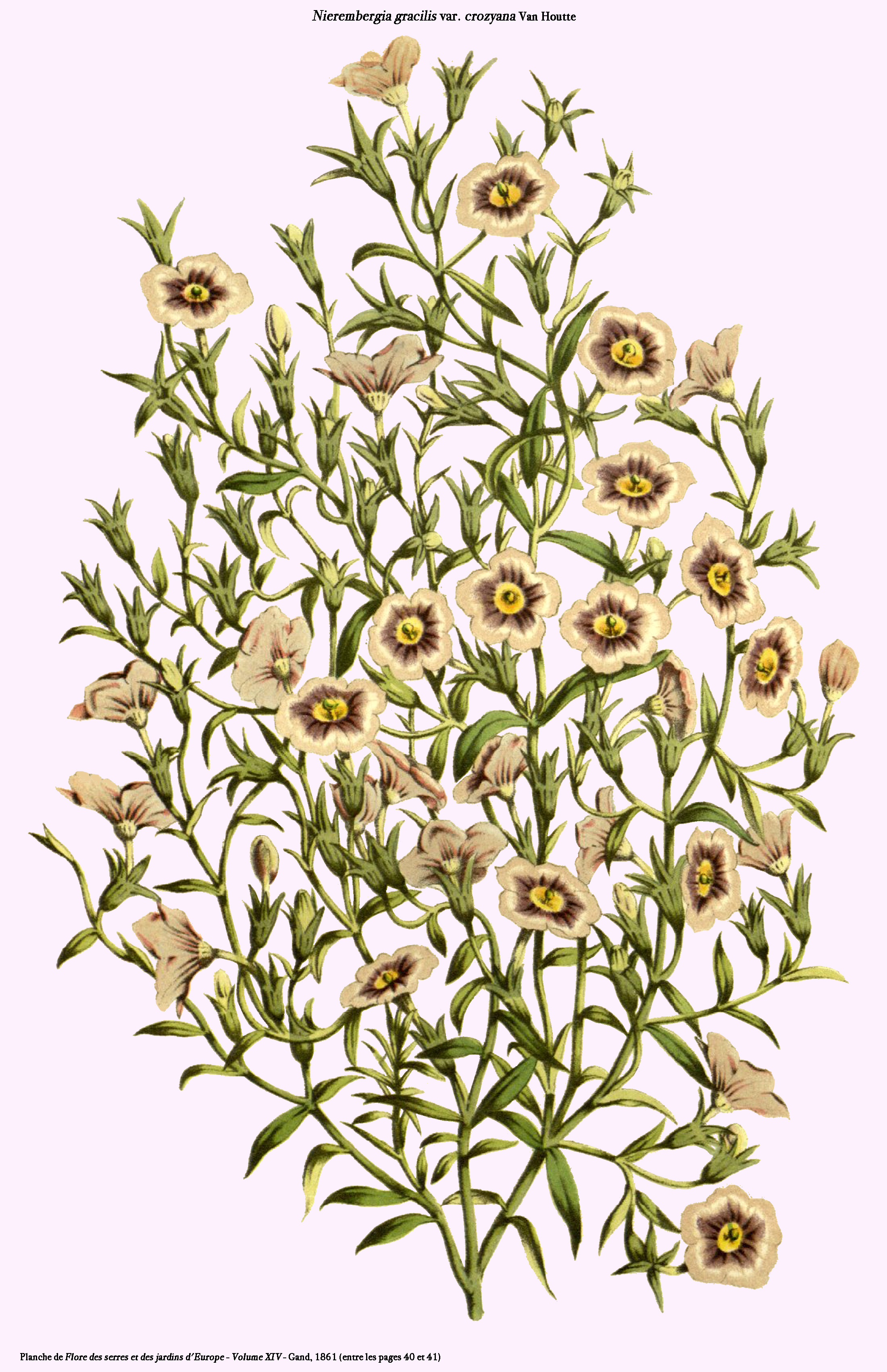 Nierembergia gracilis var crozyana - D'après la planche p. 41 de Flore des serres et jardins d'Europe - Van Houtte - Gand, 1861 - Reprise par D. Prévôt